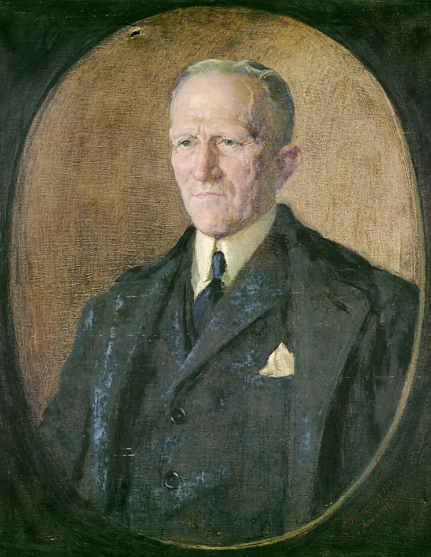 Leopold Schlözer, Porträt von Merész Gyula, Meran 1927, Schlözer-Stiftung / L 220, Niedersächsische Staats- und Universitätsbibliothek Göttingen